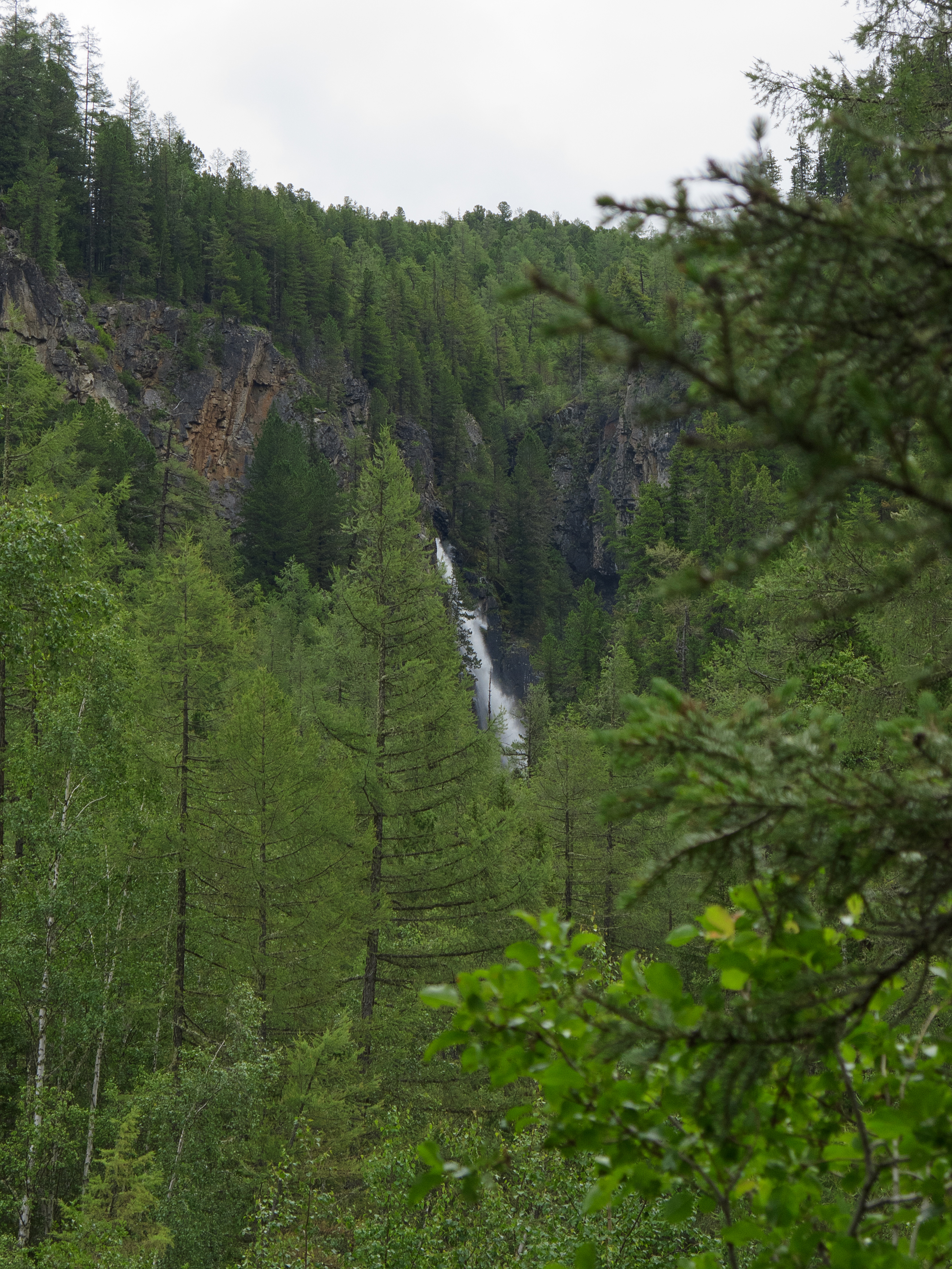 Водопад Текелю с тропы на противоположном берегу Аккема This image is related to the protected area of Russia number 0410041